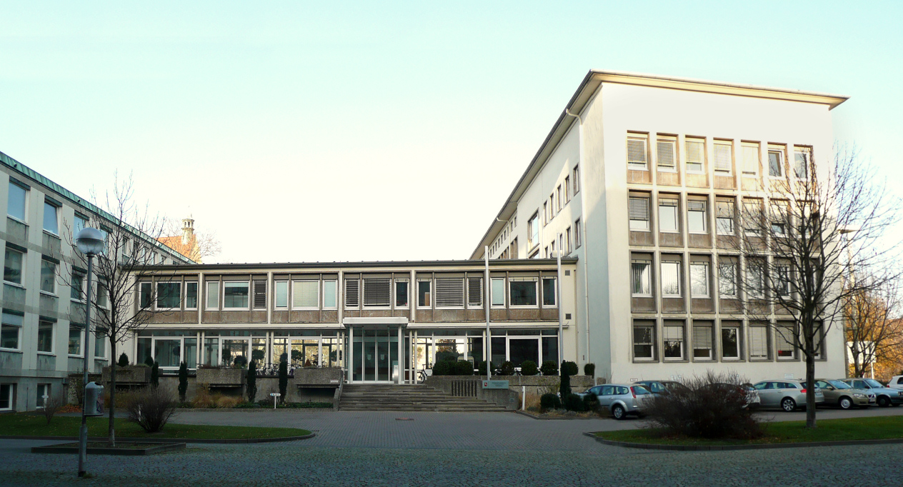 Niedersächsisches Ministerium für Ernährung, Landwirtschaft, Verbraucherschutz und Landesentwicklung